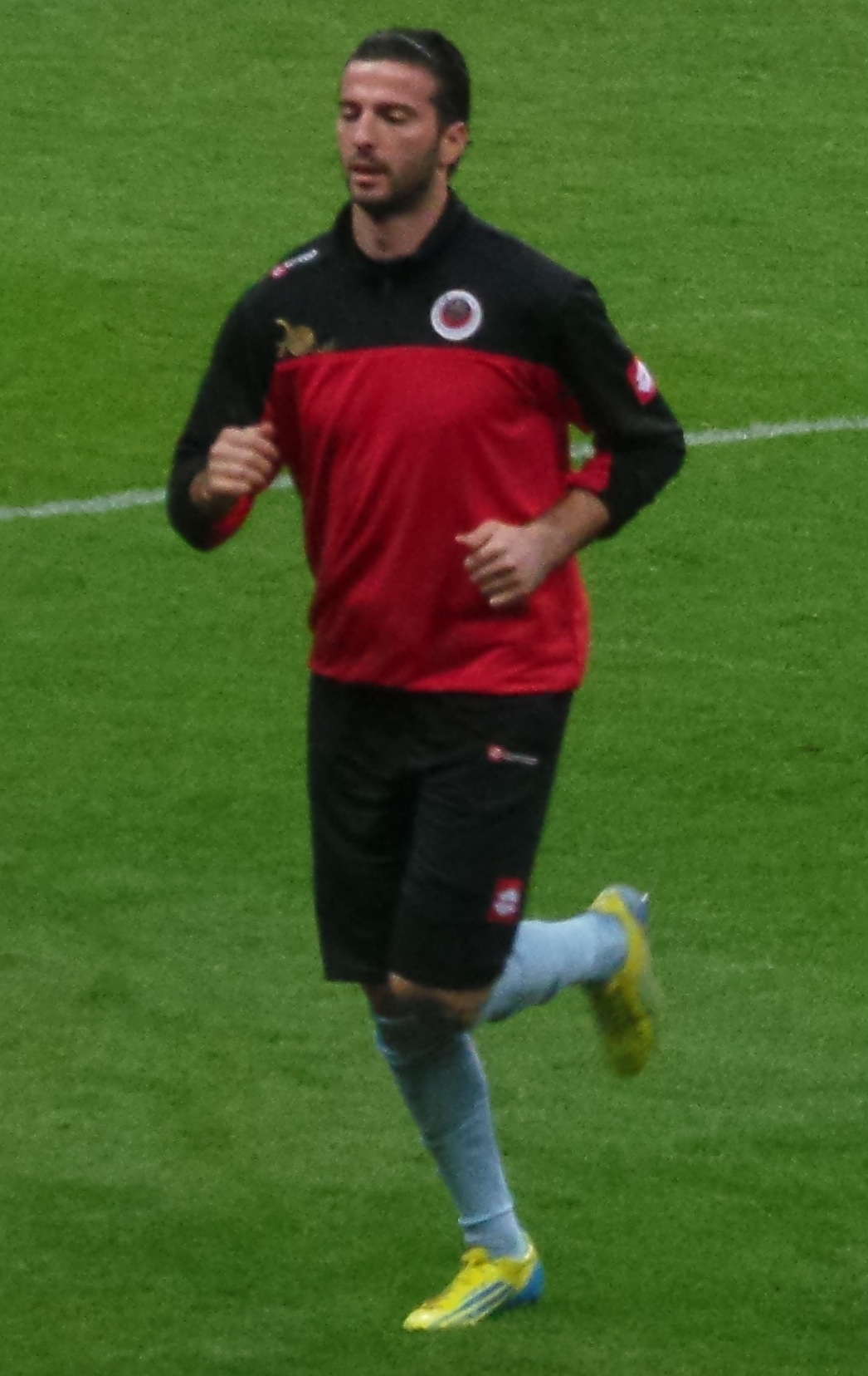 Ferhat Kaplan